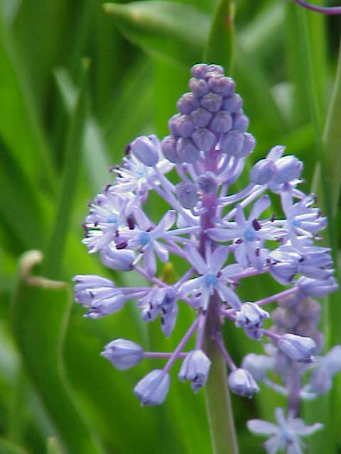 Species: Scilla litardierei Family: Liliaceae Image No. 1